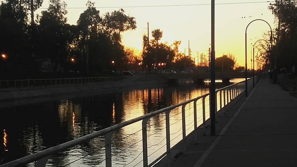 Cruzando el puente